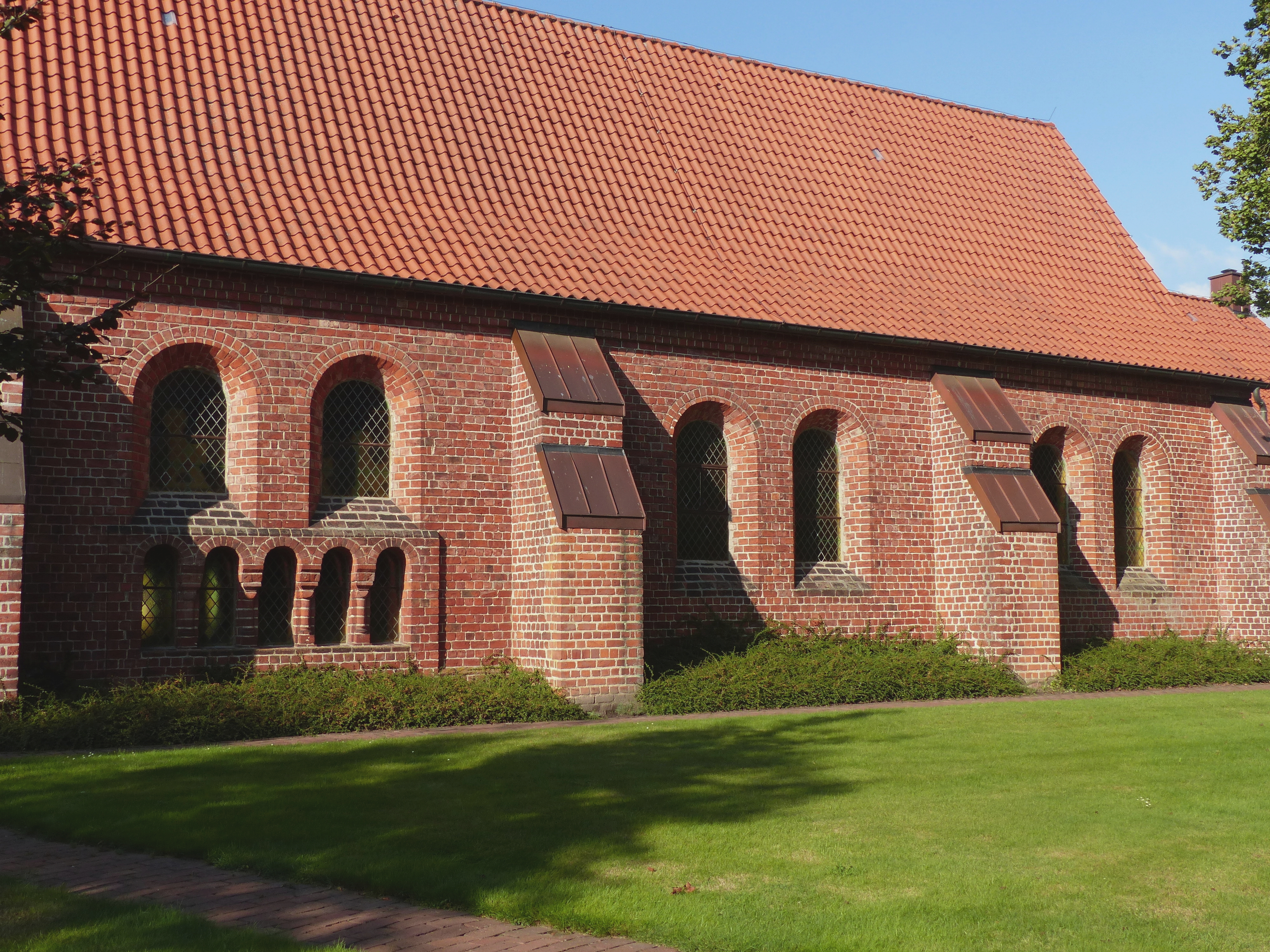 Dorfkirche Sudwalde: Kirchenschiff von Süden